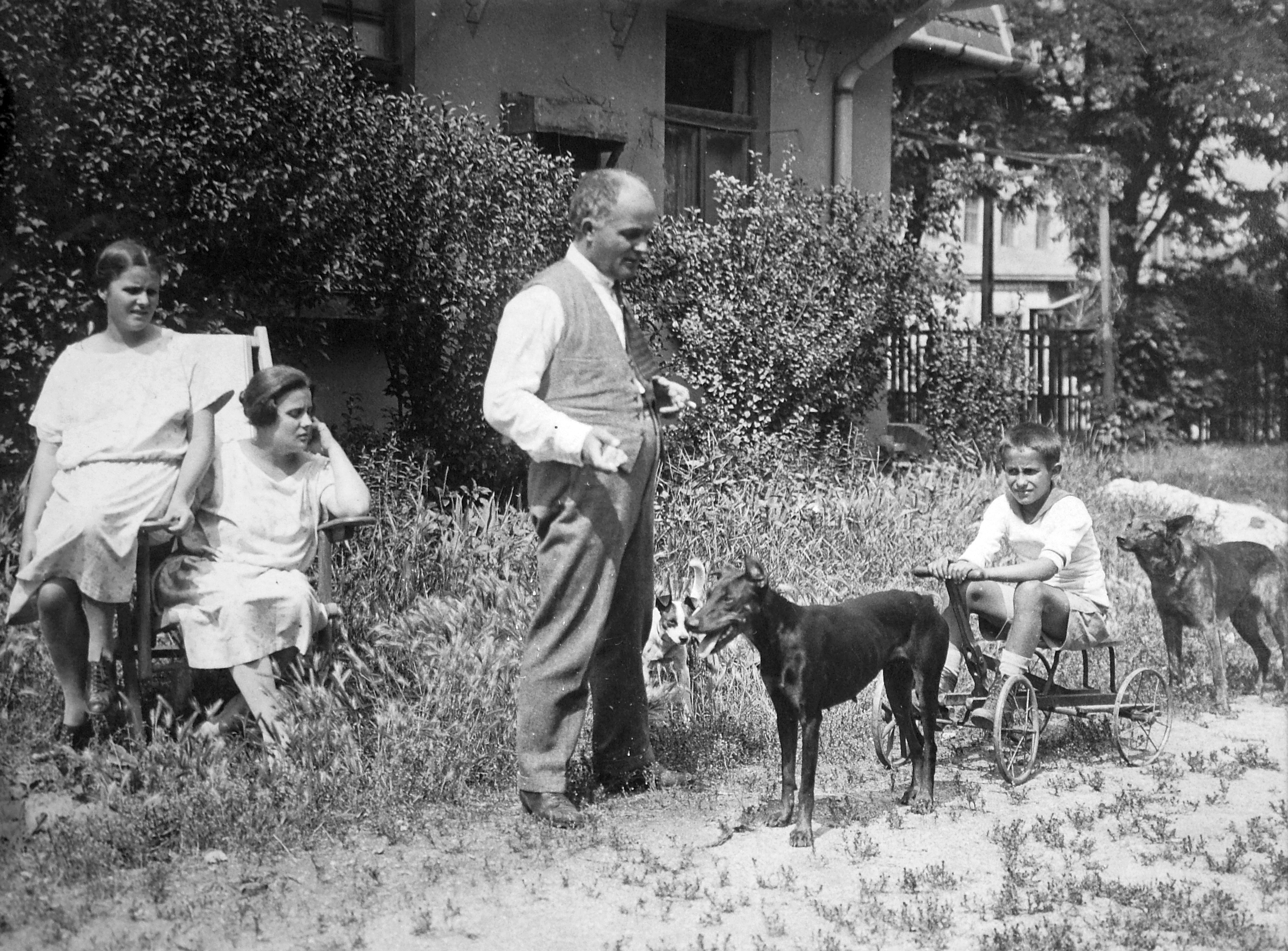 Százados úti Művésztelep, Vass Viktor szobrászművész és gyermekei. Location: Hungary, Budapest VIII. Tags: art, dog, yard, genre painting, man, women, deck chair, kid, boy, Budapest Title: Százados úti Művésztelep, Vass Viktor szobrászművész és gyermekei.